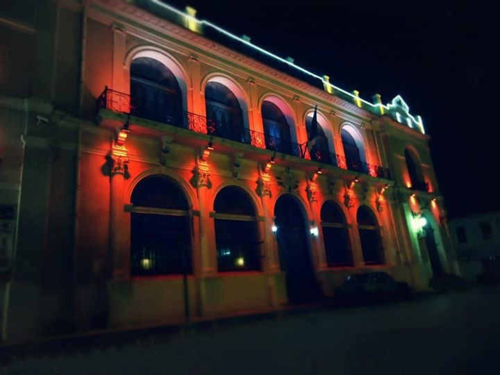 المسرح الجهوي لولاية باتنة